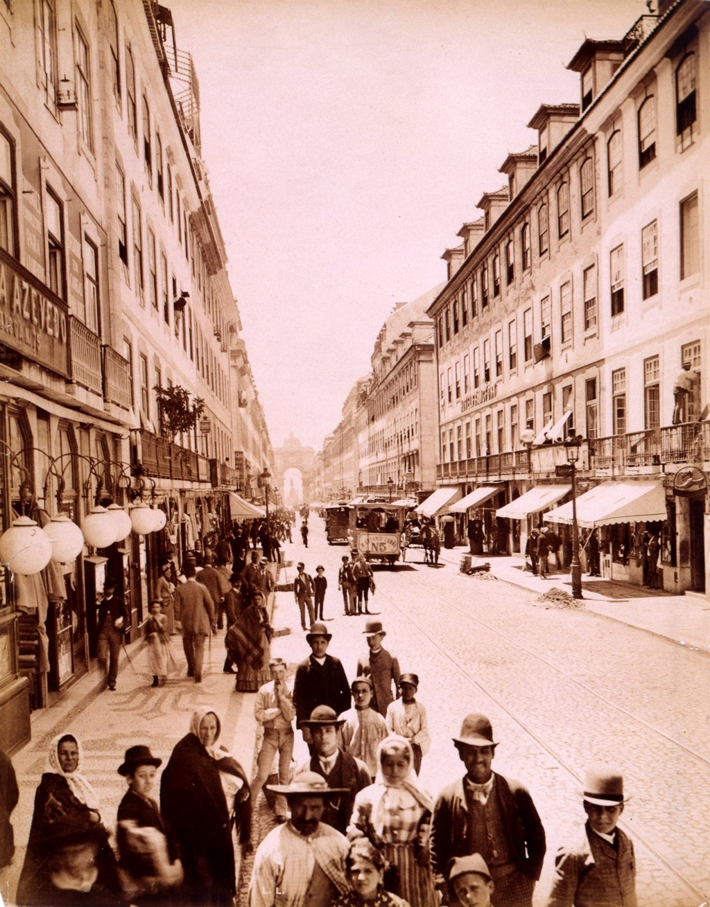 Rua Augusta, Lisboa, em 1890